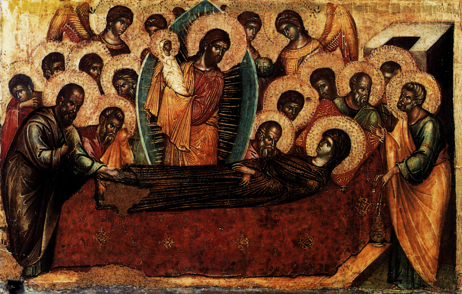 Paolo Veneziano, Dormizione della Vergine (Venezia, Chiesa di San Pantalon)